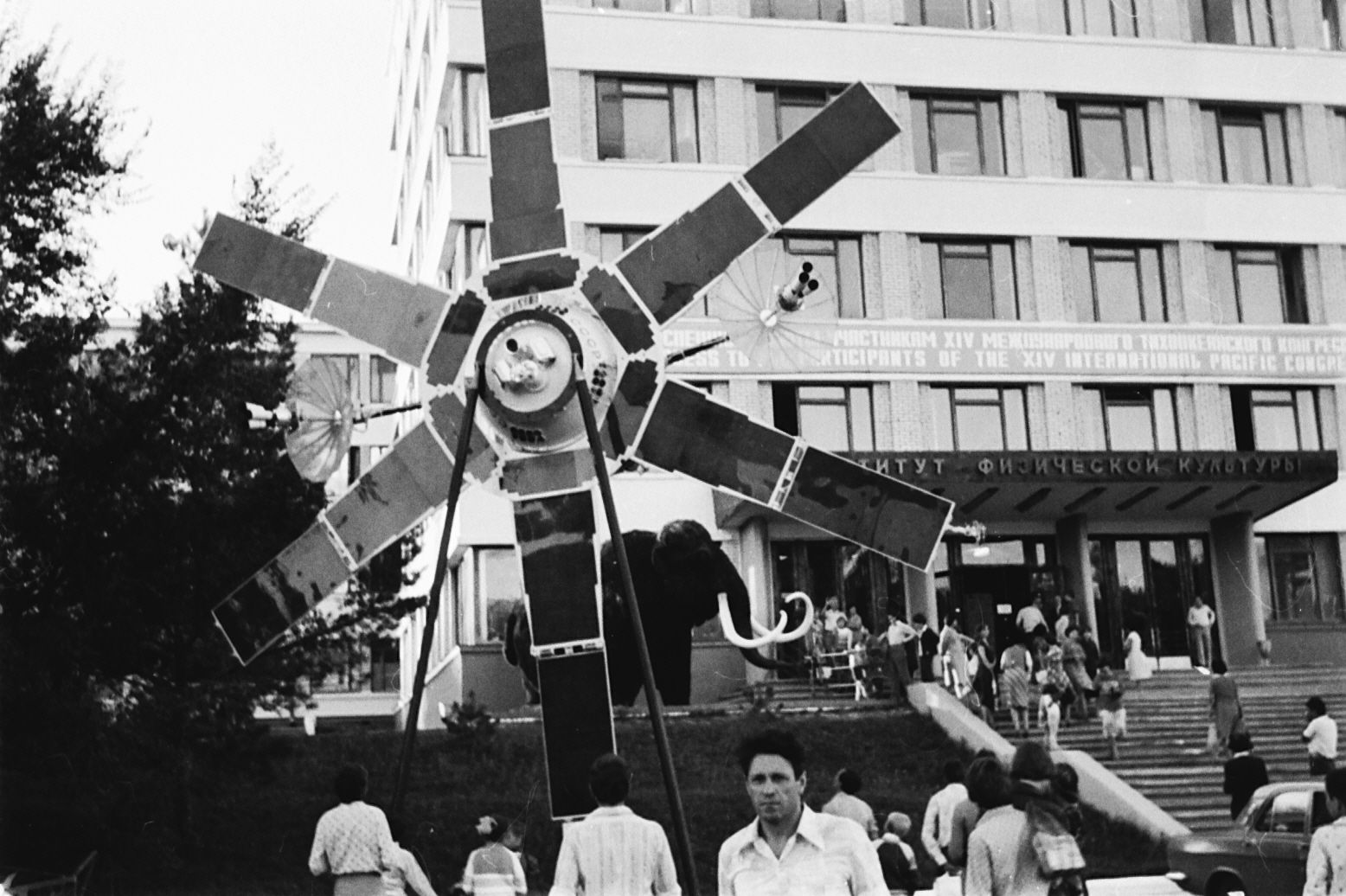 Хабаровск, институт физкультуры в 1979 году